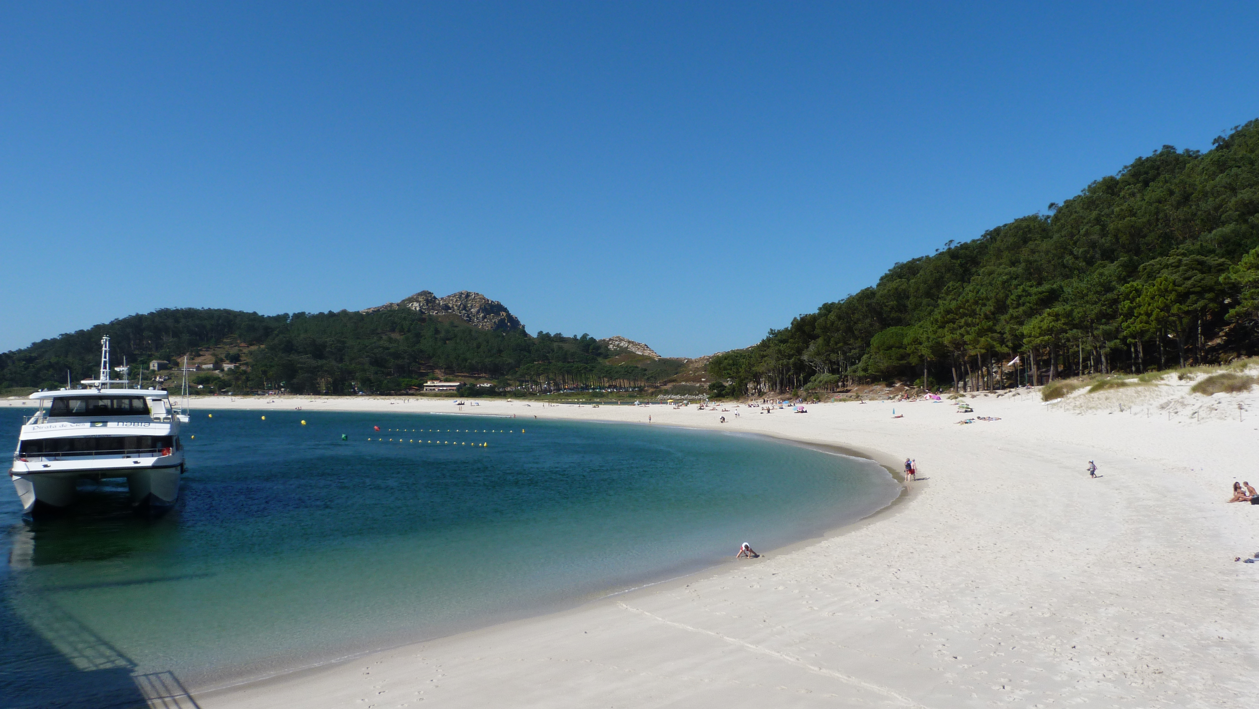 Islas Cíes This is a photography of a Site of Community Importance in Spain with the ID: ES0000001. Natura2000 entry, EEA entry